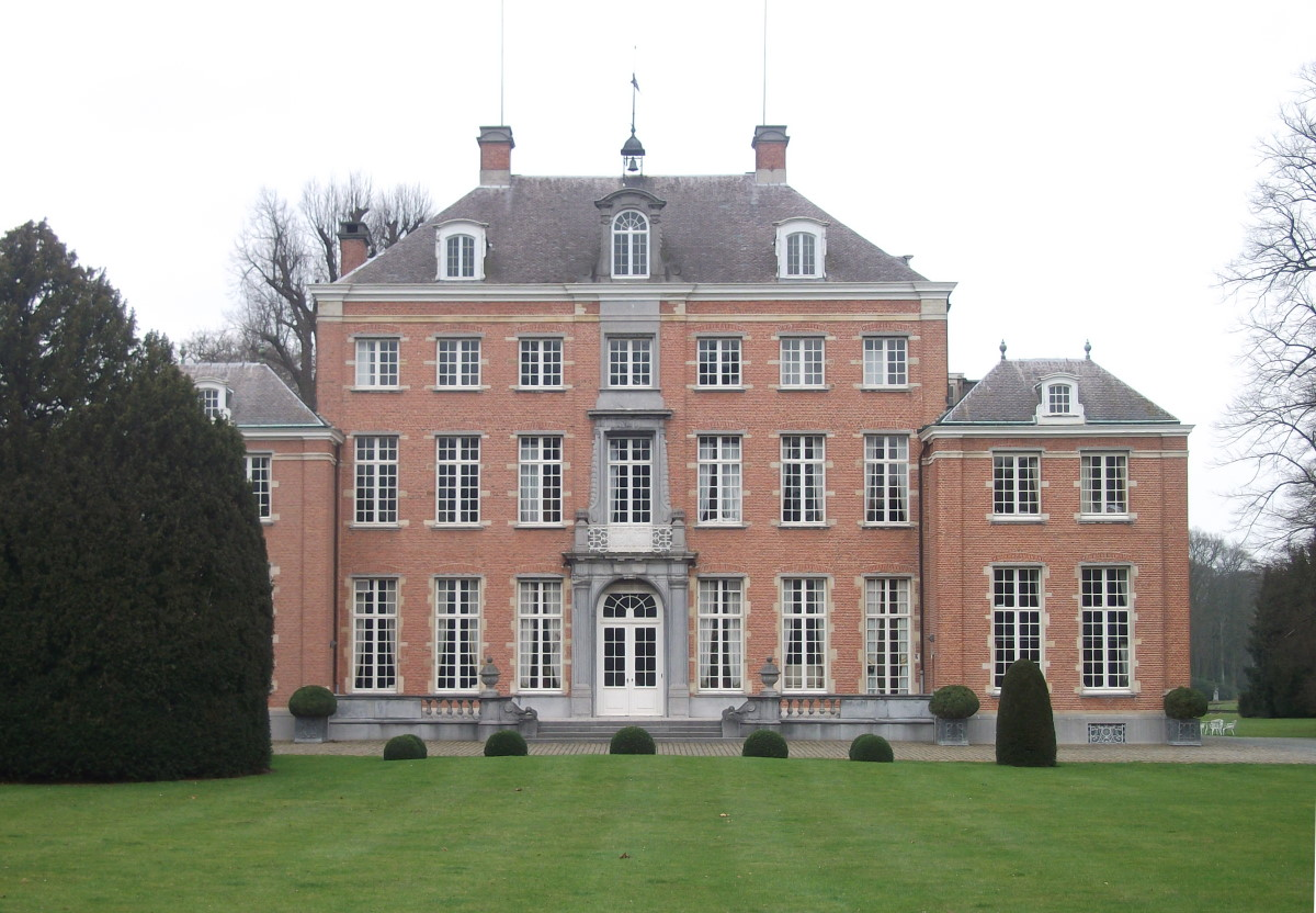 Kasteel Kijckuit, Wijnegem, België